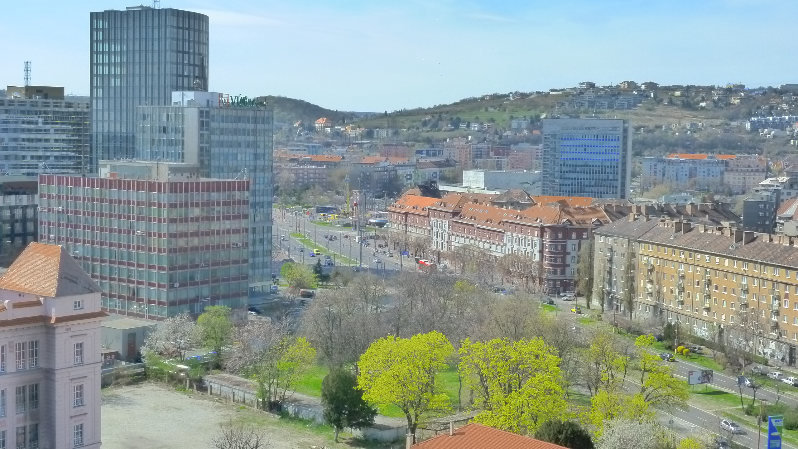 POHĽAD NA TRNAVSKÉ MÝTO - VIEW ON ISTROPOLIS